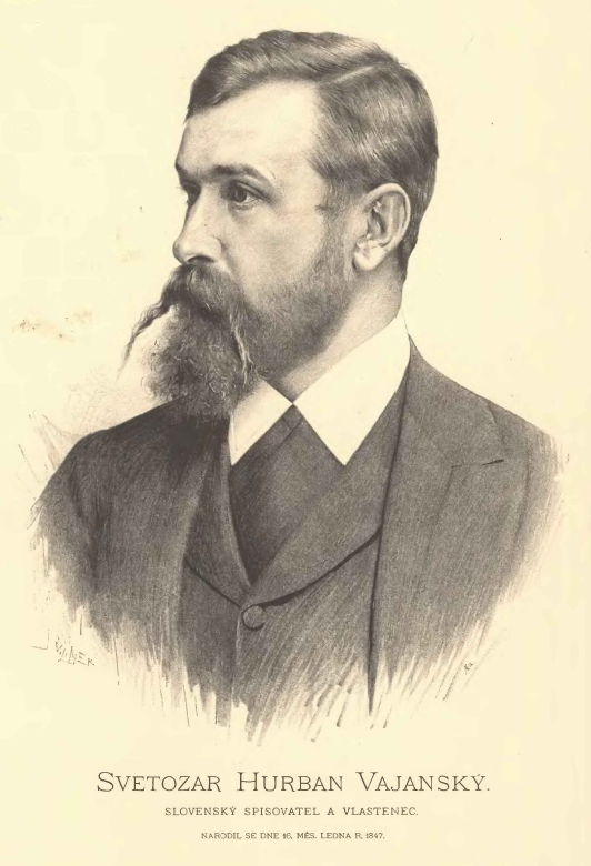 Portréty českých osobností od Jana Vilímka